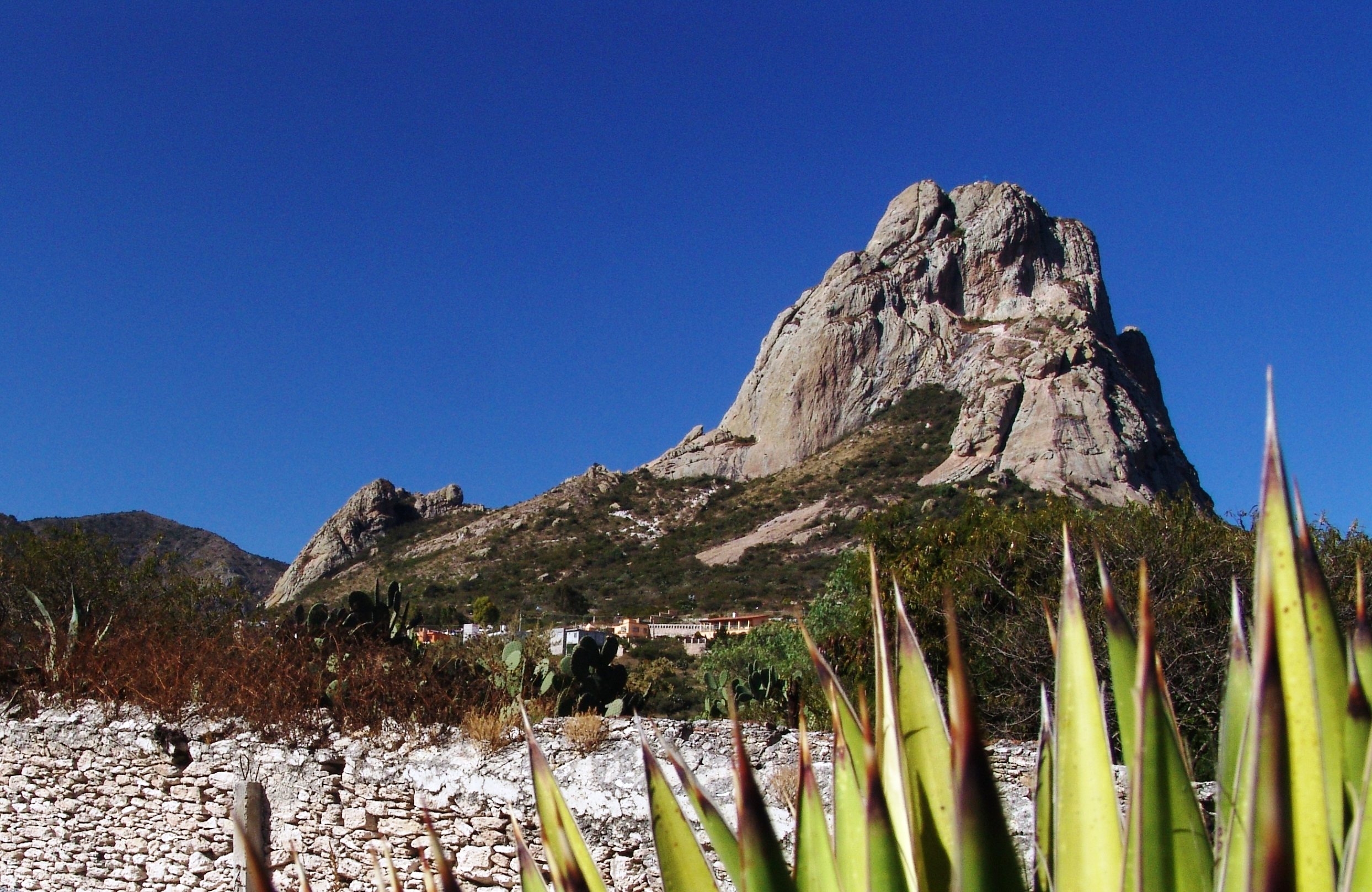 Desde el Antiguo Camino Real al Pueblo Magico de Bernal, en el Estado de Querétaro, México.